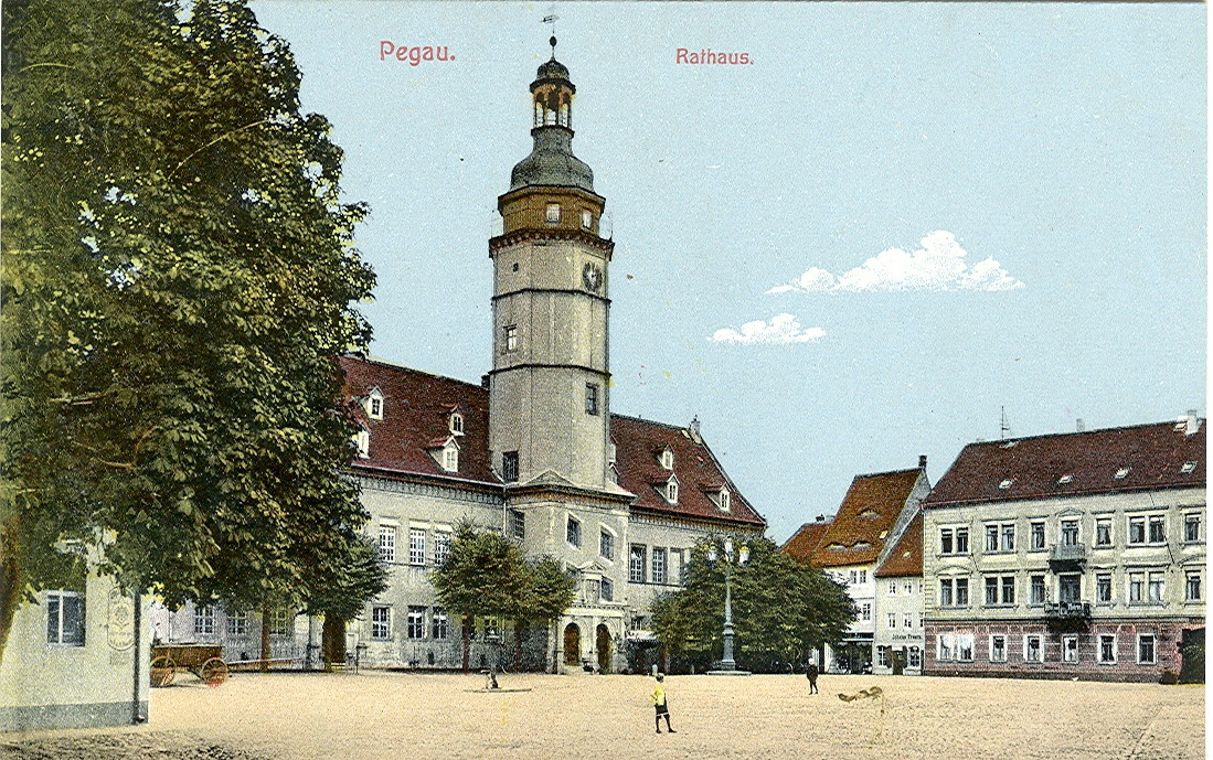 Postkarte, undatiert ( ca. 1914 ). Beschriftung: "Pegau - Rathaus".